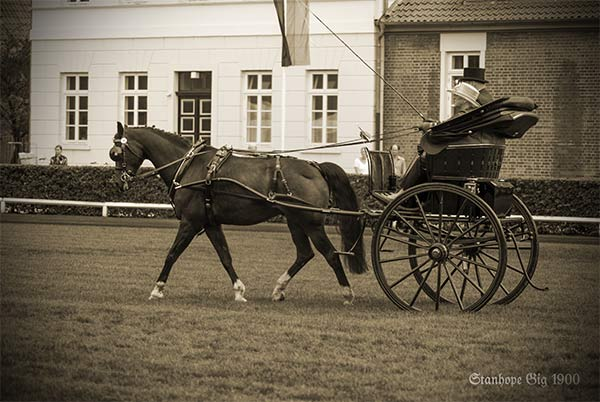 Stanhope Gig, Original von 1900 (Besitzer: Bert de Mooij) bei der CIAT Celle 2015